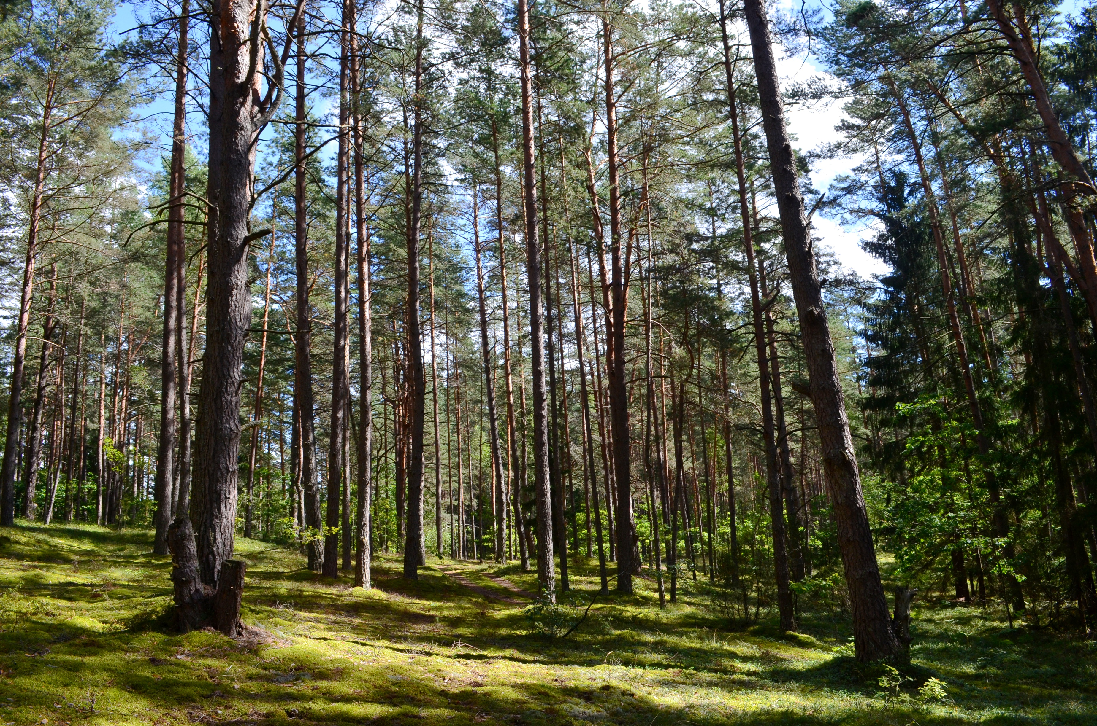 Labanoro giria netoli Stirnelės, Molėtų raj.